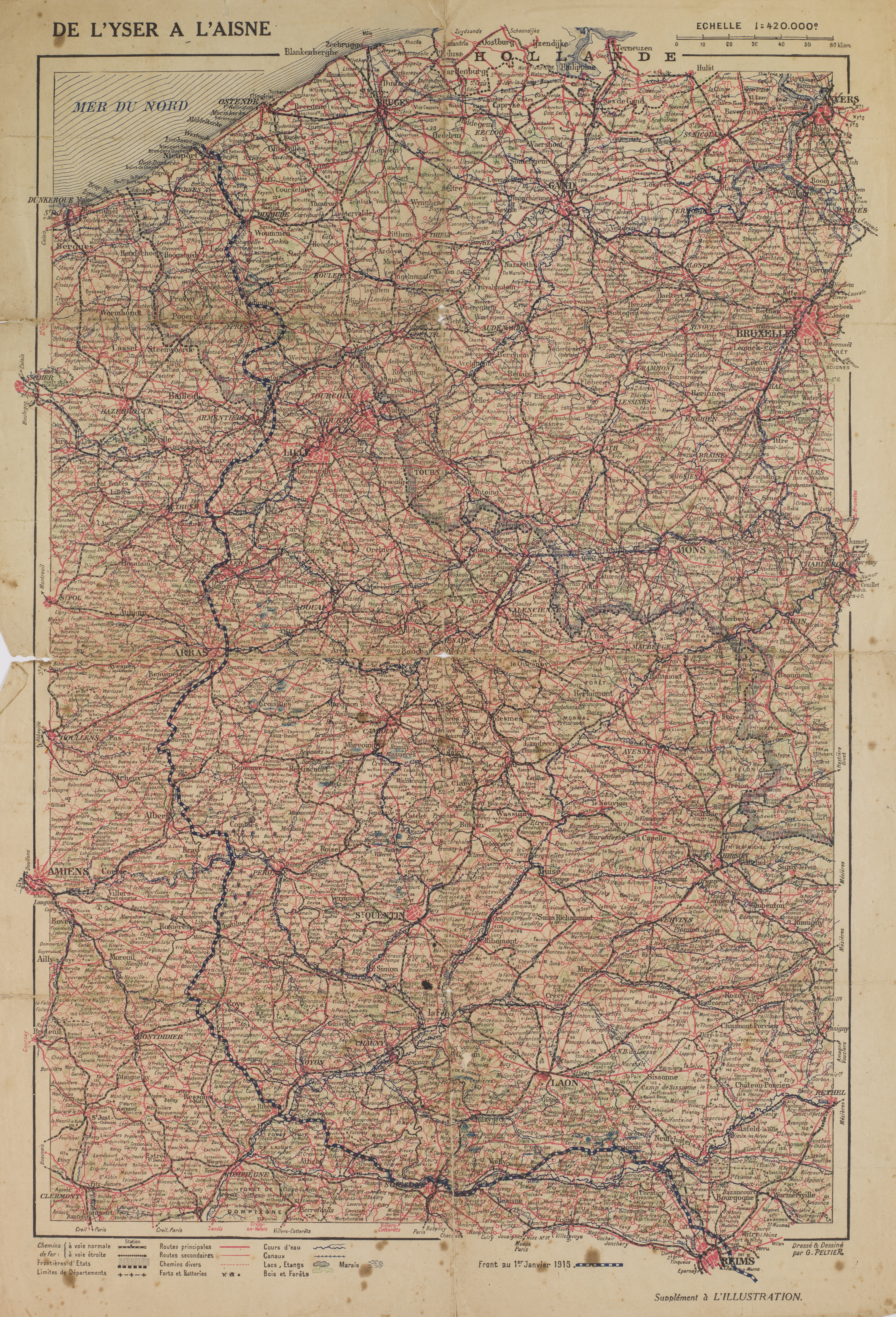 Obra que integra o acervo do Museu Paulista da USP. Coleção João Baptista de Campos Aguirra - Ref. Agente: Supplément À L'Illustration